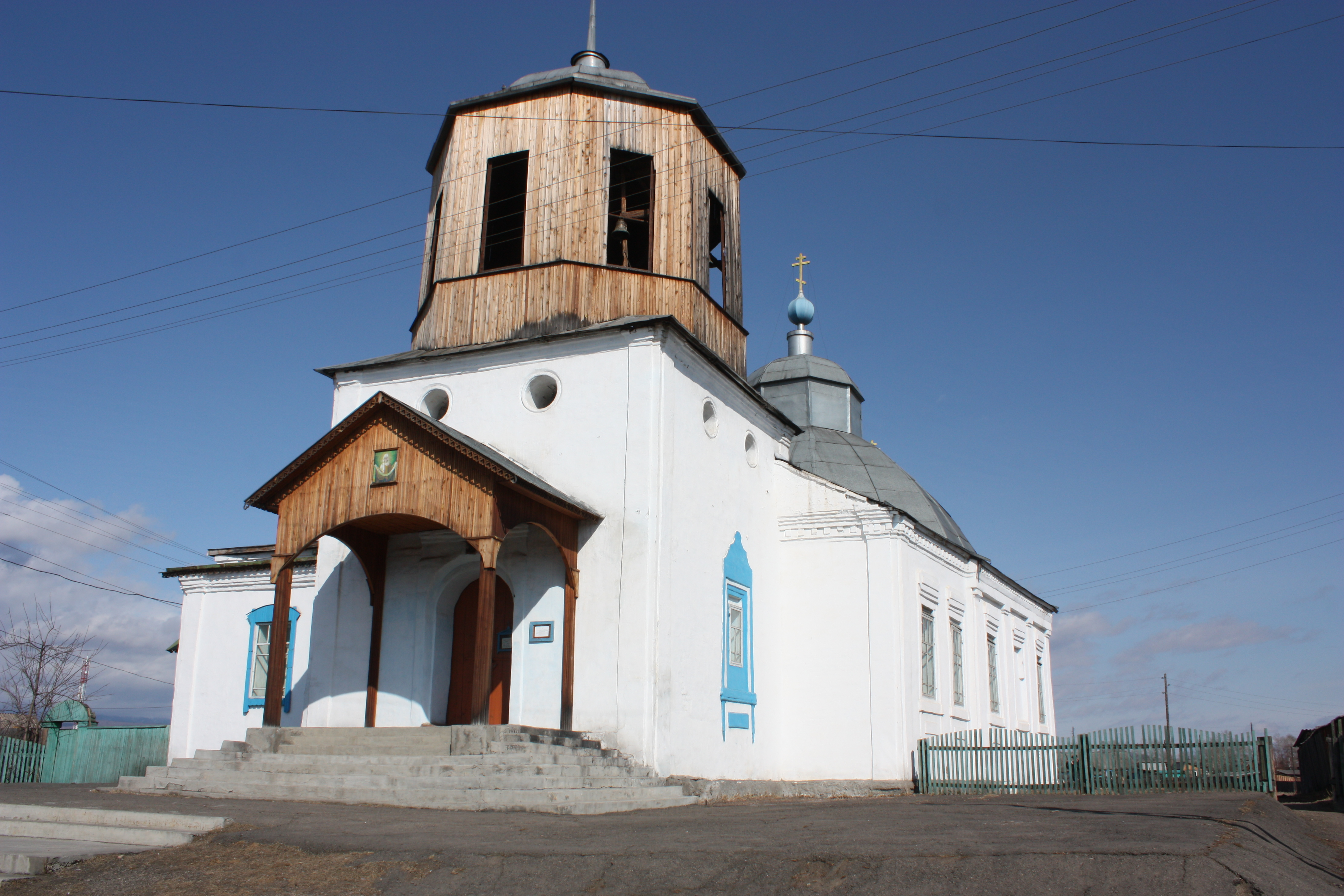 Покровская церковь в с.Тунка